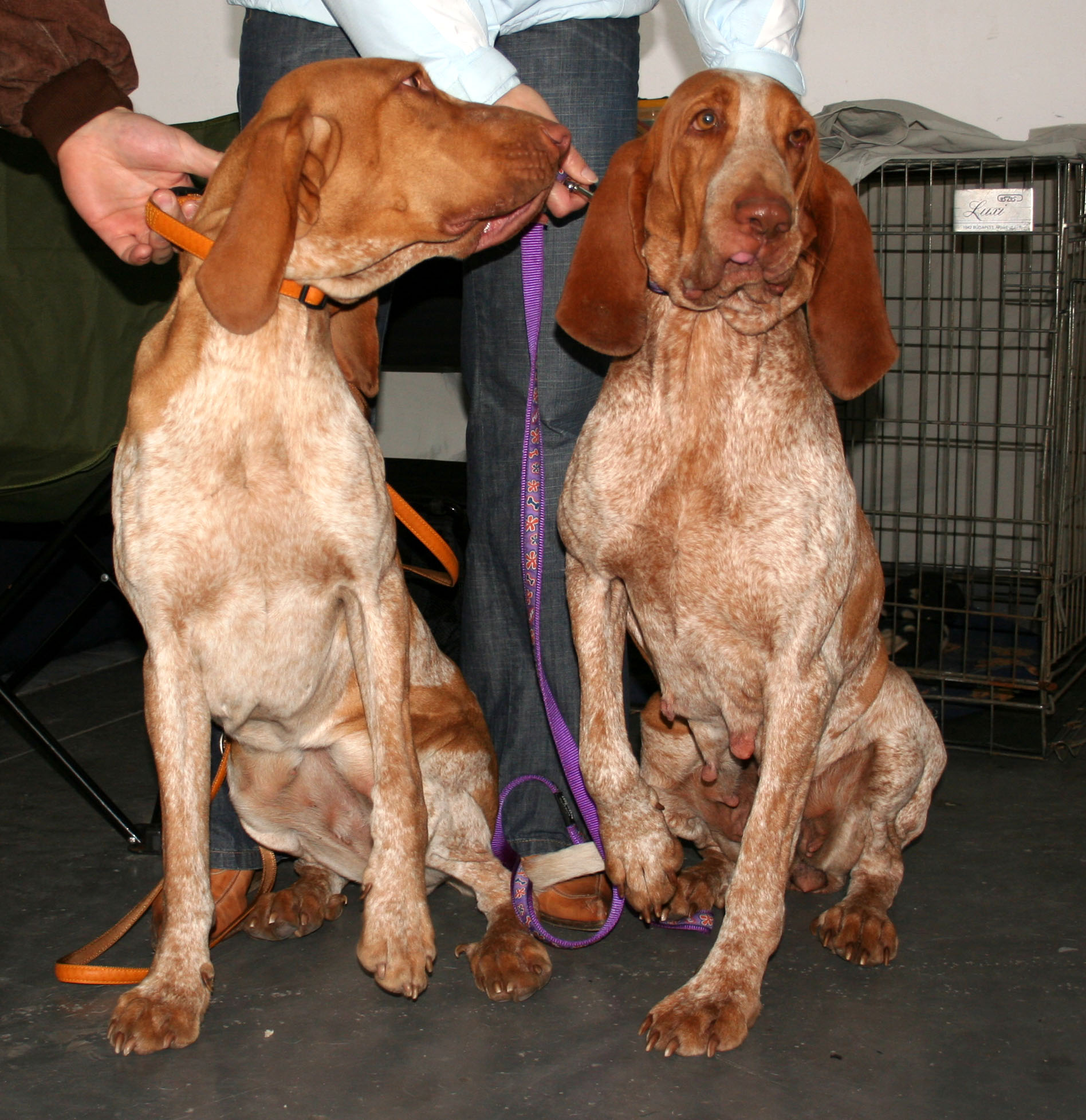 Bracco_italiano na Światowej Wystawie Psów Rasowych w Poznaniu